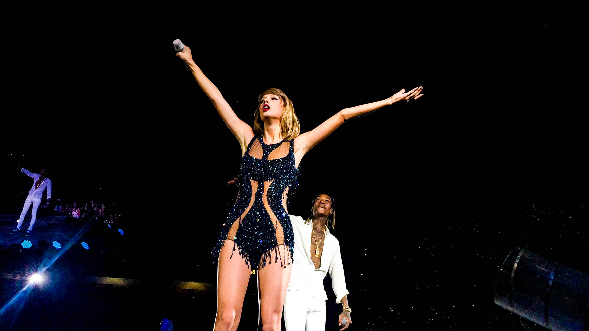 IMG_8060-2